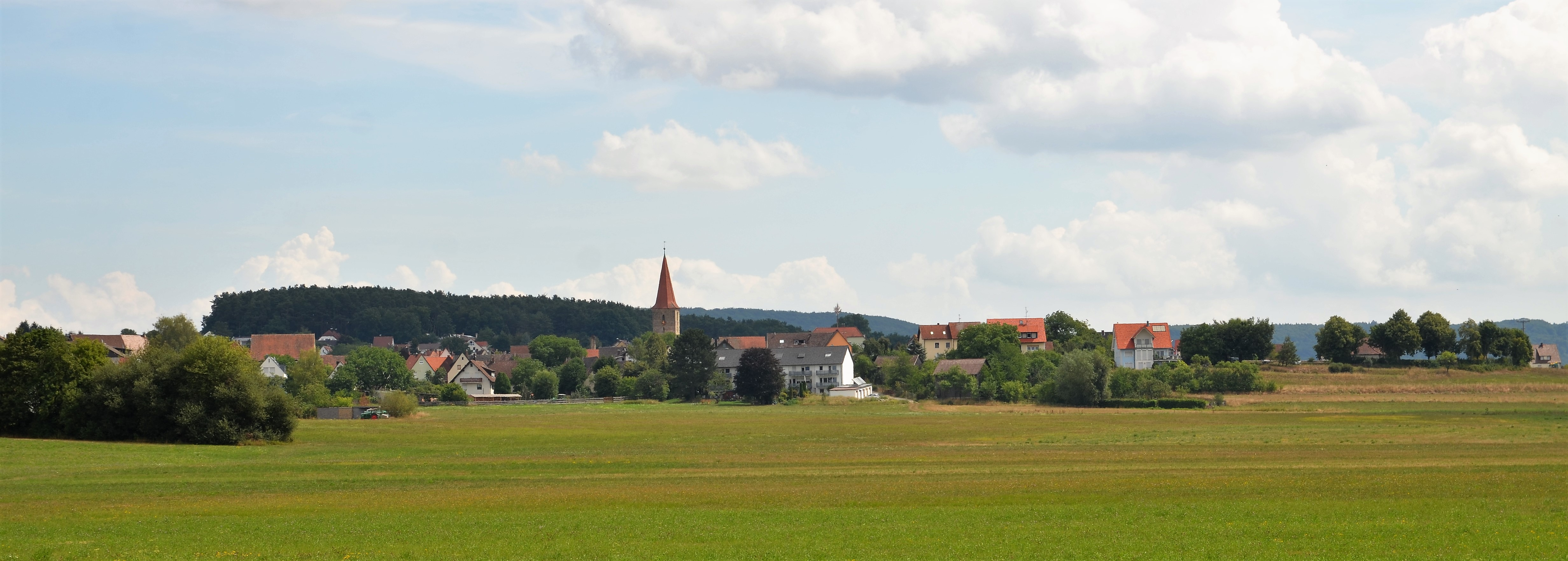 Blick auf Leinburg aus südlicher Richtung